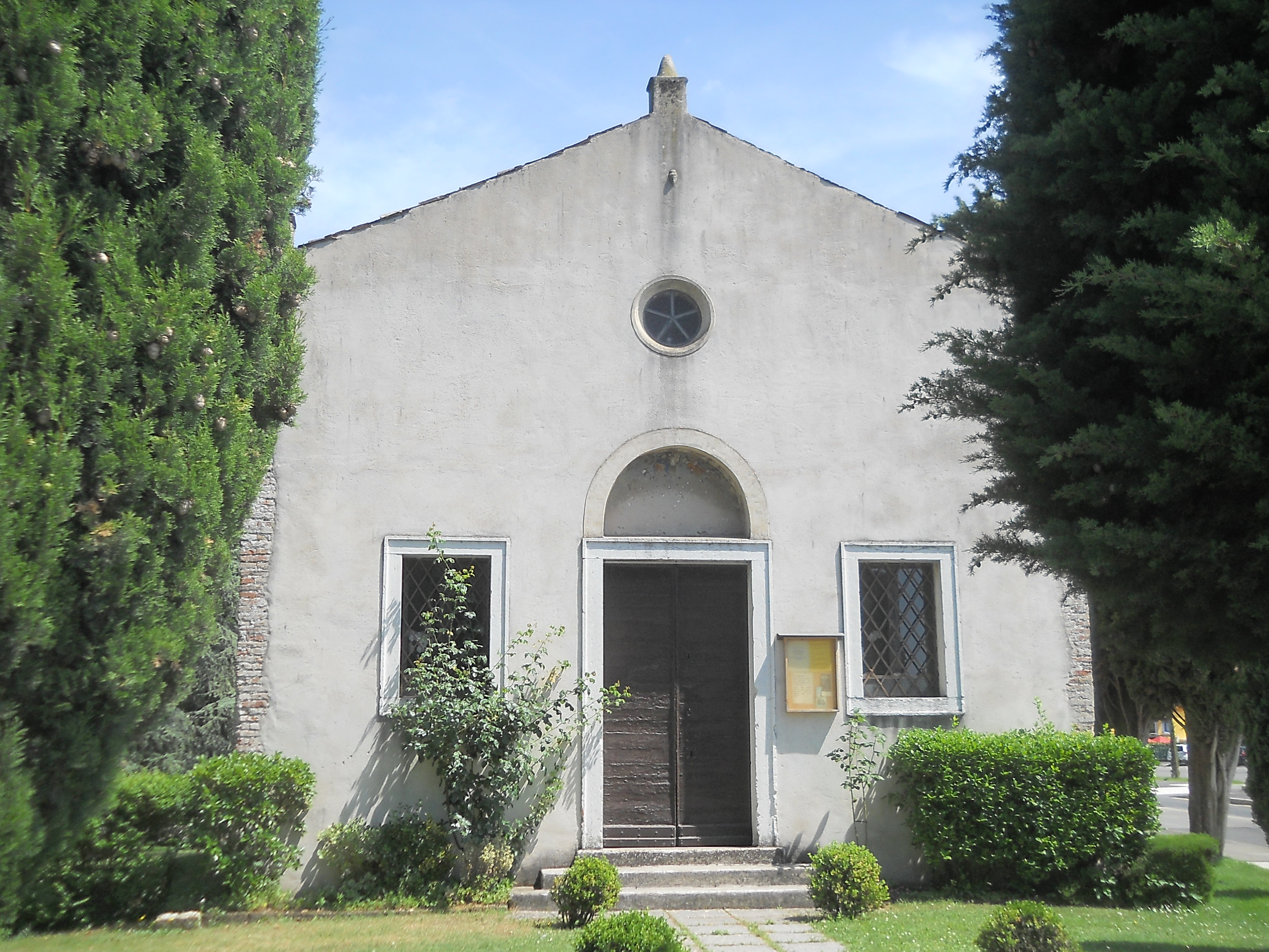 Facciata della chiesetta di San Rocco a Bussolengo (provincia di Verona)